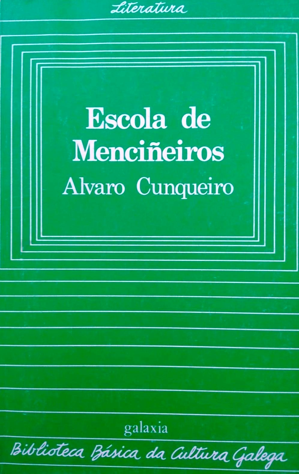 Biblioteca Básica da Cultura Galega, 47, Escola de menciñeiros, Álvaro Cunqueiro